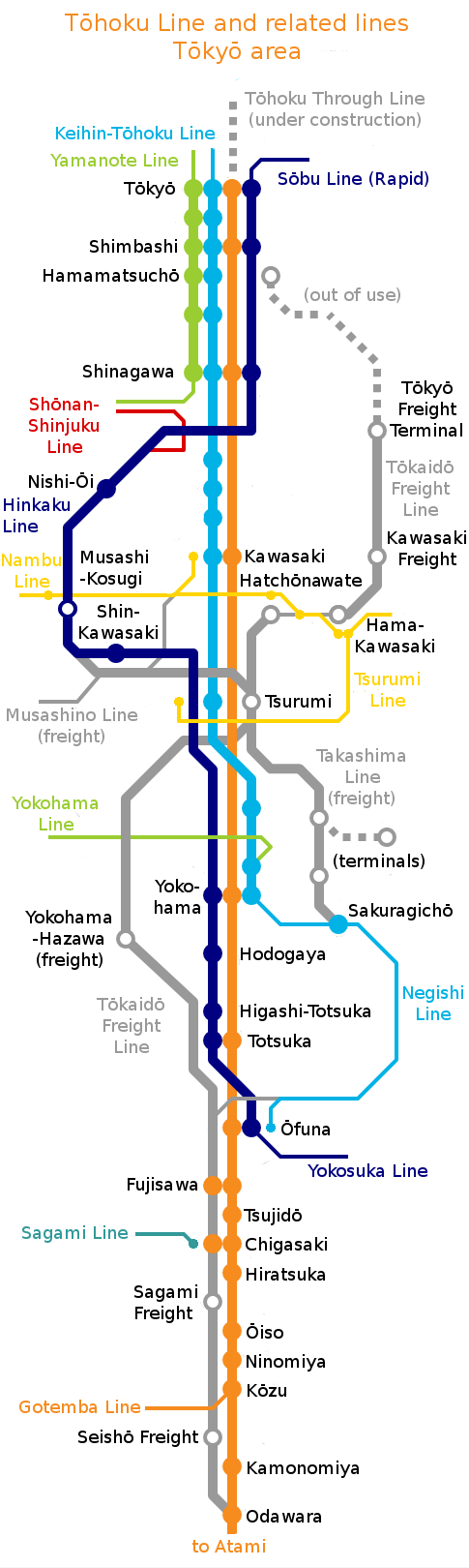 JR東海道本線東京口 系統・支線路線図 Tokaido Main Line and related lines in Tokyo area English version of original work by Wikimedia Commons user Rail Rider, translated by user Nankai